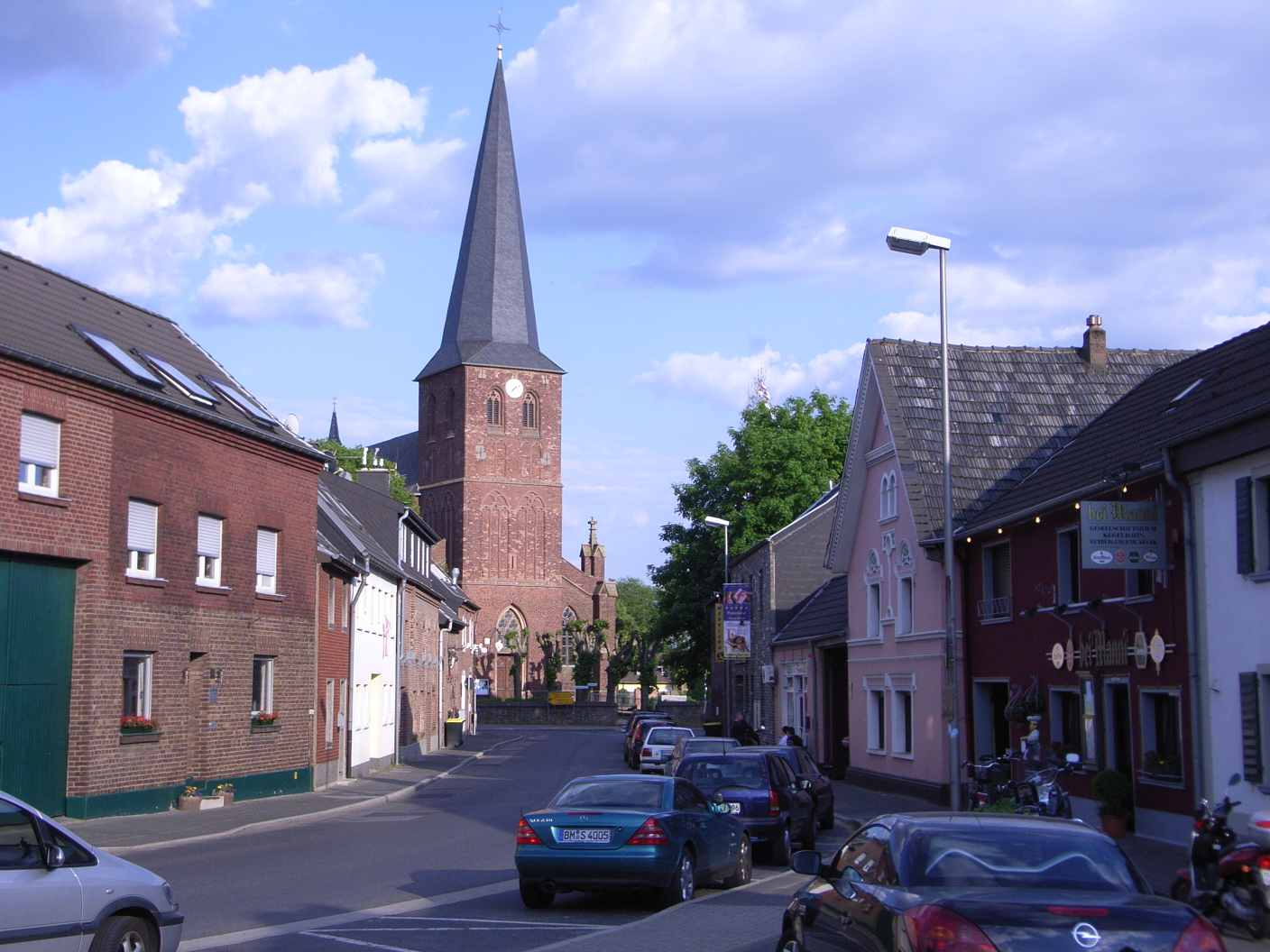 Bedburg-Kirchherten, kath. Pfarrkirche St. Martinus